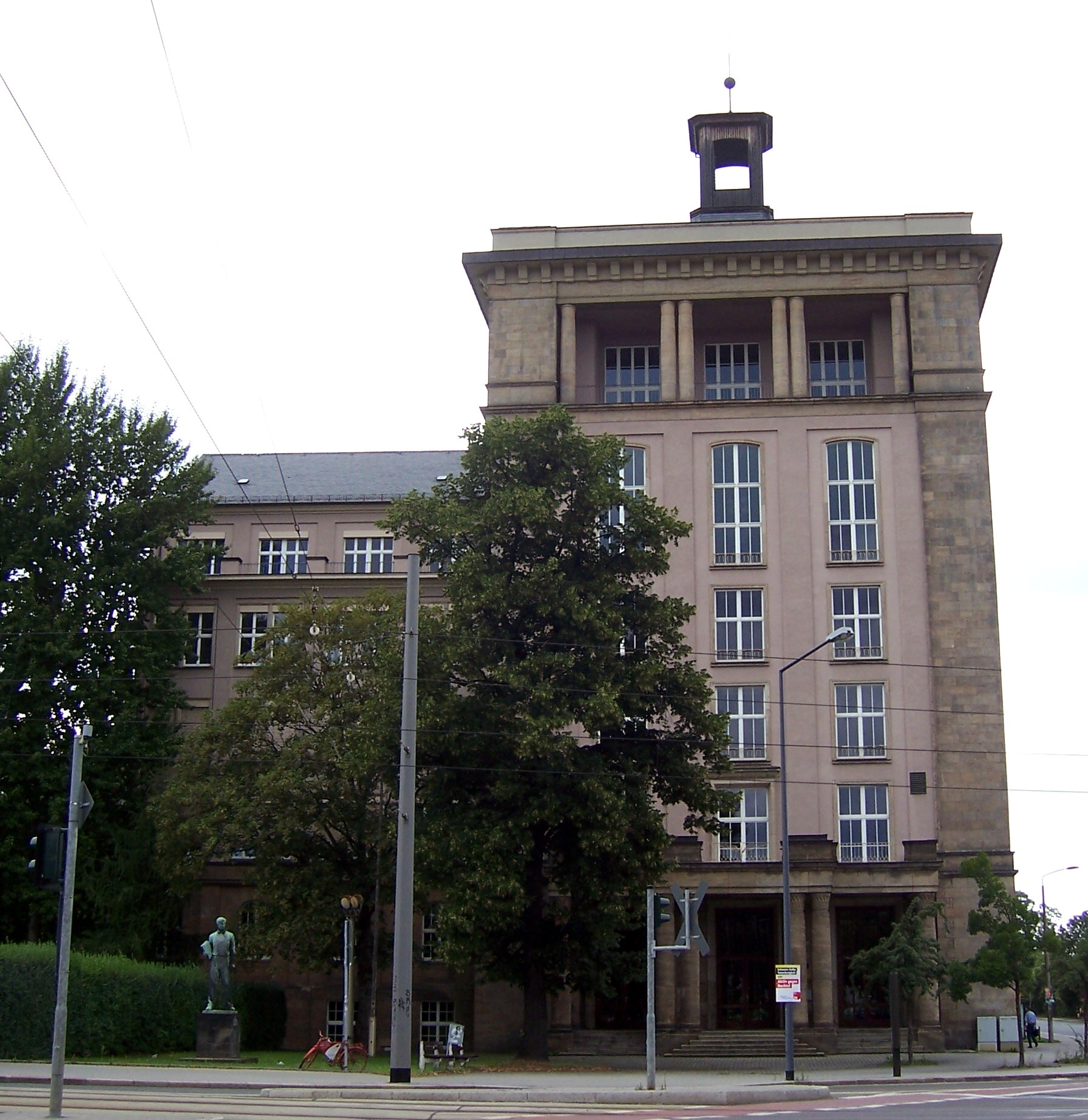 ehem. Ingenieurschule für Verkehrstechnik Dresden, Strehlener Platz